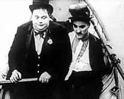 Fotografía de la película The Rounders de Charlie Chaplin